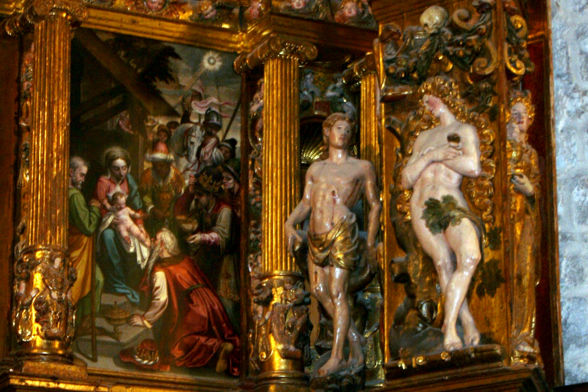 Detalle del retablo mayor de la iglesia de San Eutropio de El Espinar (Segovia). En la imagen se aprecia, en bulto redondo, imagen de San Sebastián, y en relieve la talla de Eva, obras del escultor Francisco Giralte; en pintura, tabla de la Adoración de los Reyes, de Alonso Sánchez Coello.